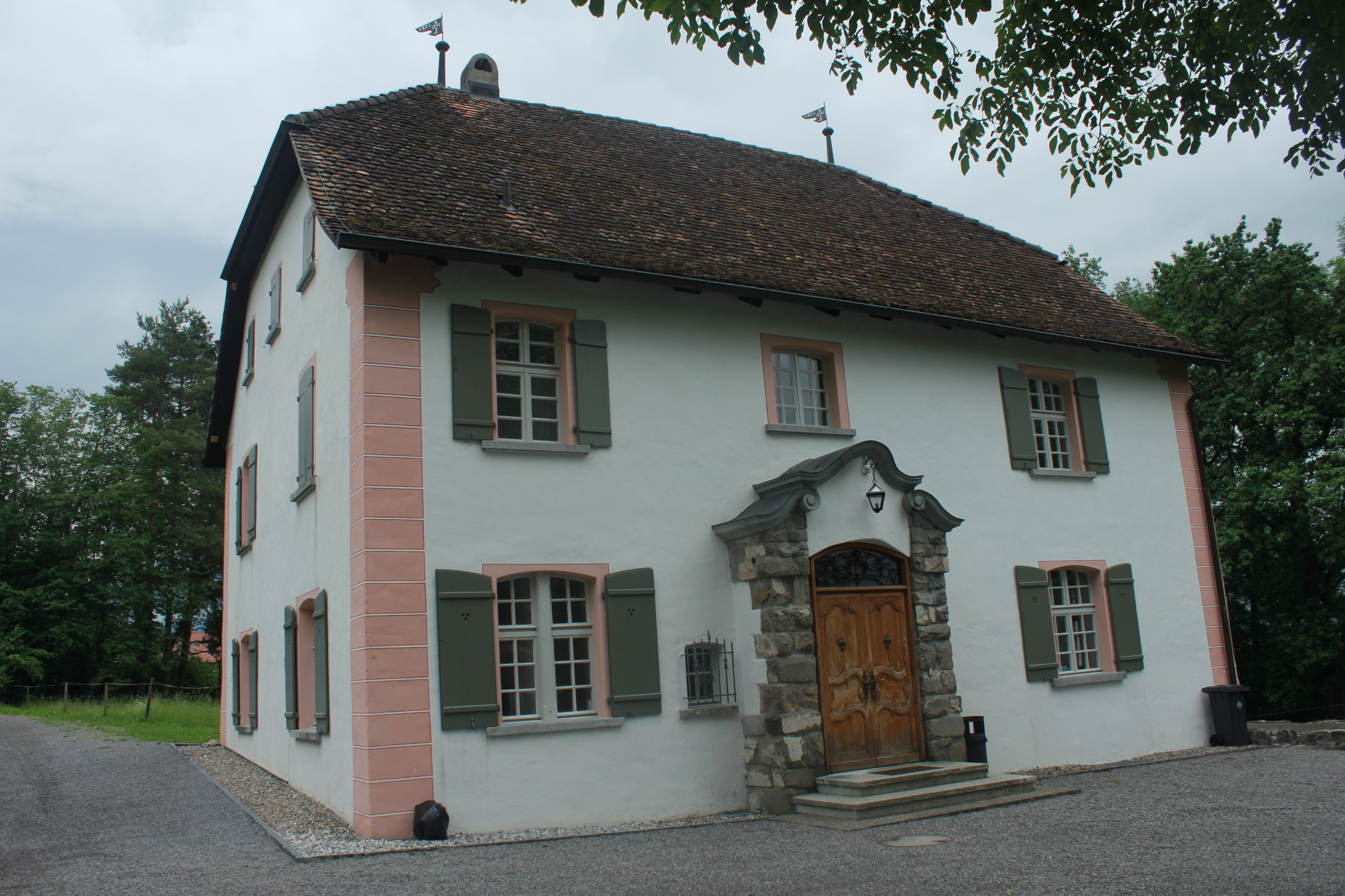 Das Wohngebäude im Gamanderhof, heute Sitz des Historischen Vereins für das Fürstentum Liechtenstein.